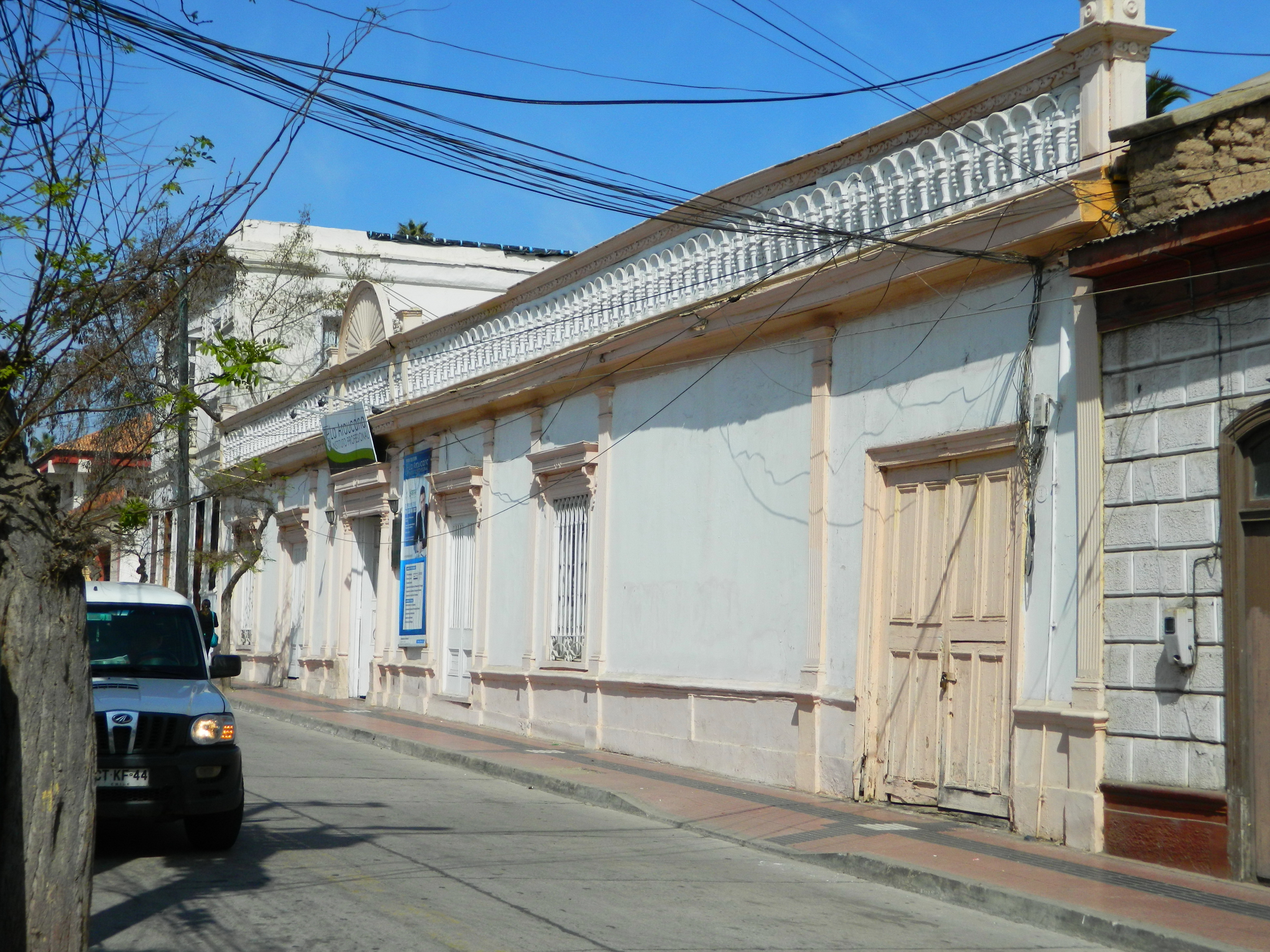 Casa Herreros This is a photo of a national monument in Chile: 347